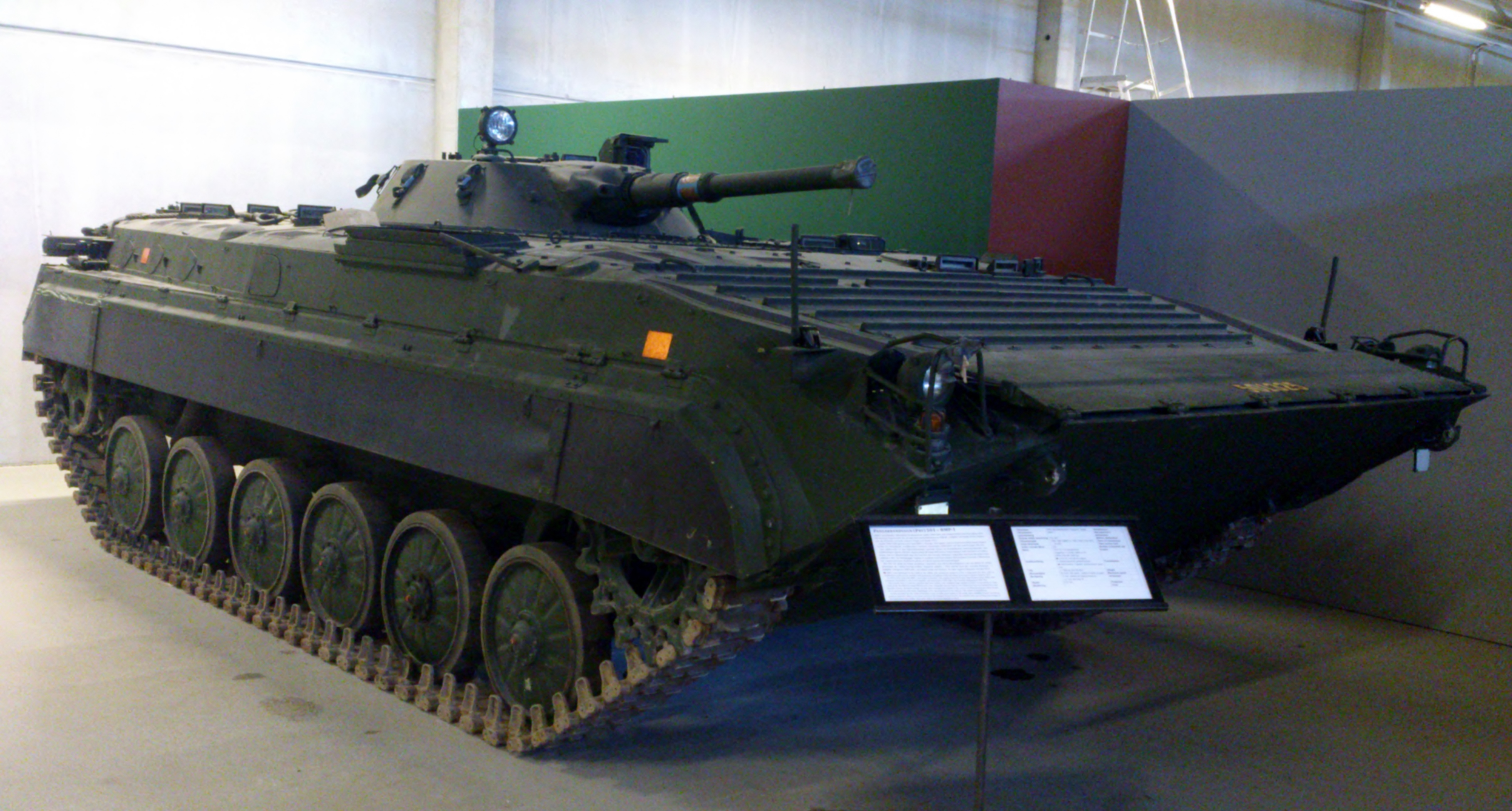 Pansarbandvagn 501 på Försvarsfordonsmuseet Arsenalen i Strängnäs